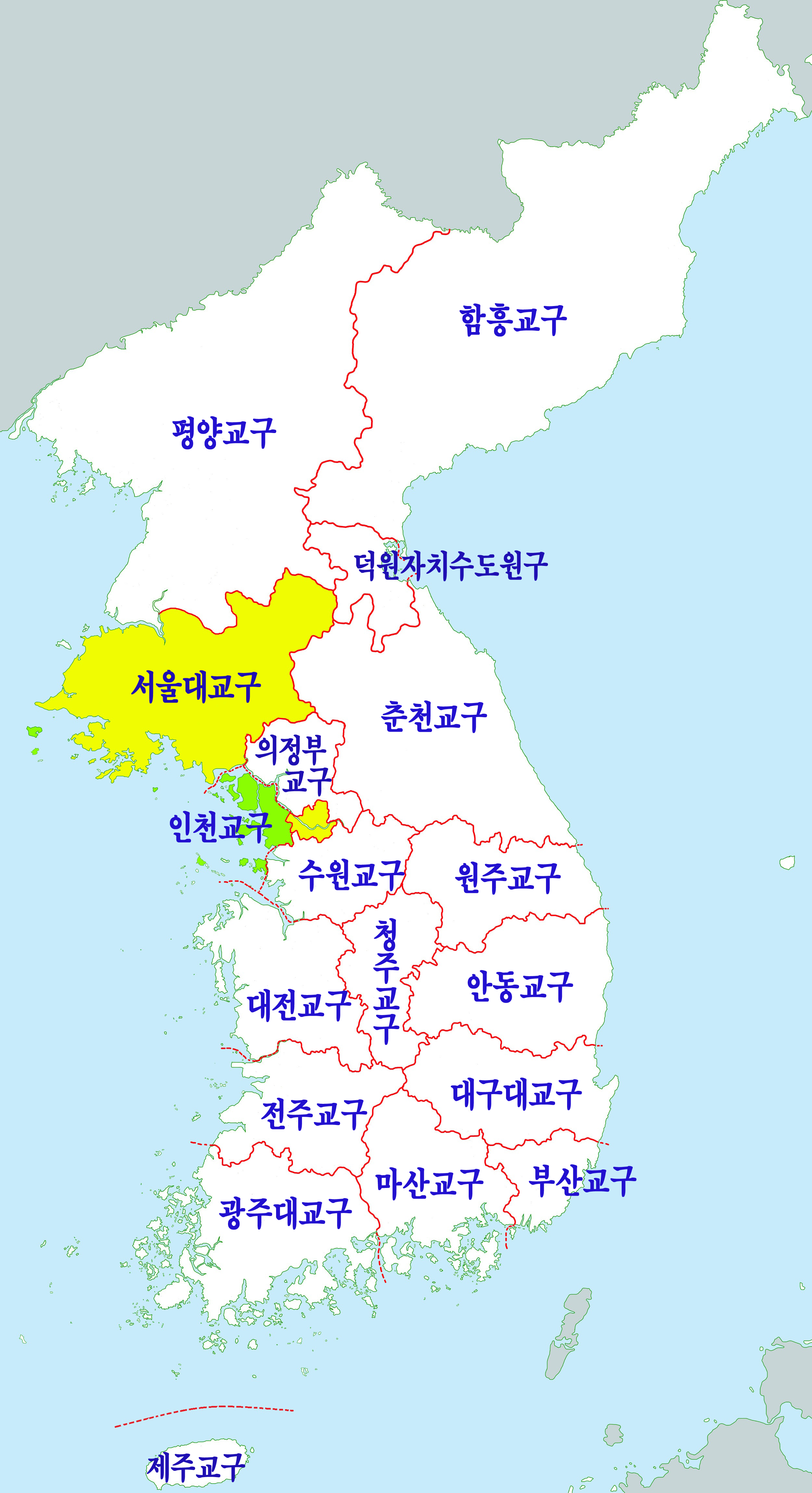 한국천주교 교구 관할도